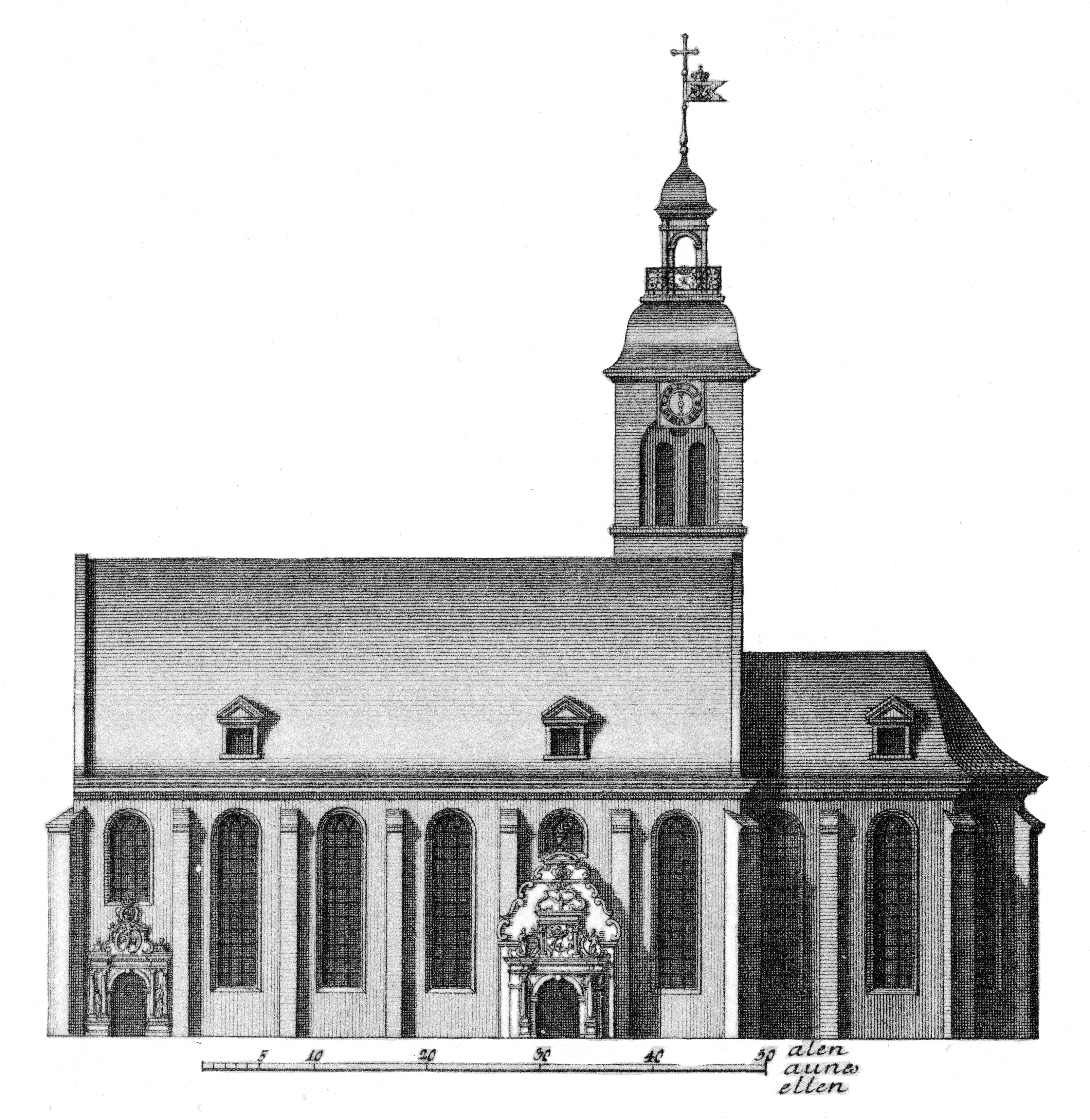 From Hafnia Hodierna by Laurids de Thurah, 1748. Tab.LXXXVII, Helligåndskirken